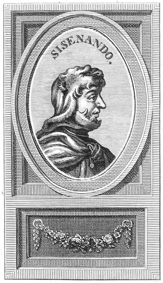 Reyes visigodos de Hispania. Retrato de Sisenado